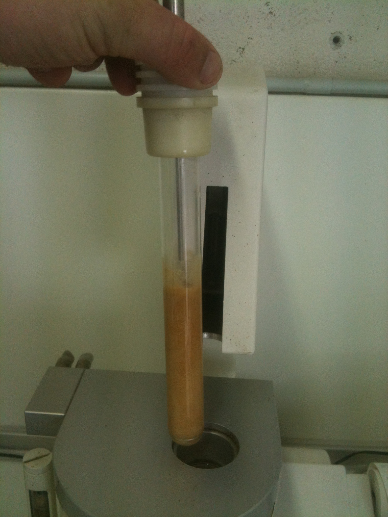 Fallzahlmessgerät nach Messung